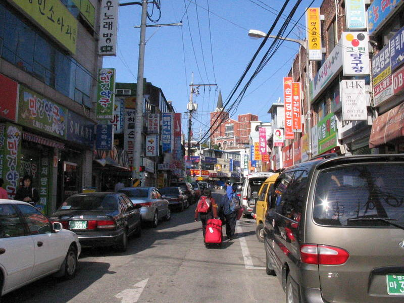 Date : février 2005 Source : photo personnelle du contributeur Mammique Description : Rue ayant conservé son architecture traditionnelle à Musan en Corée. Licence